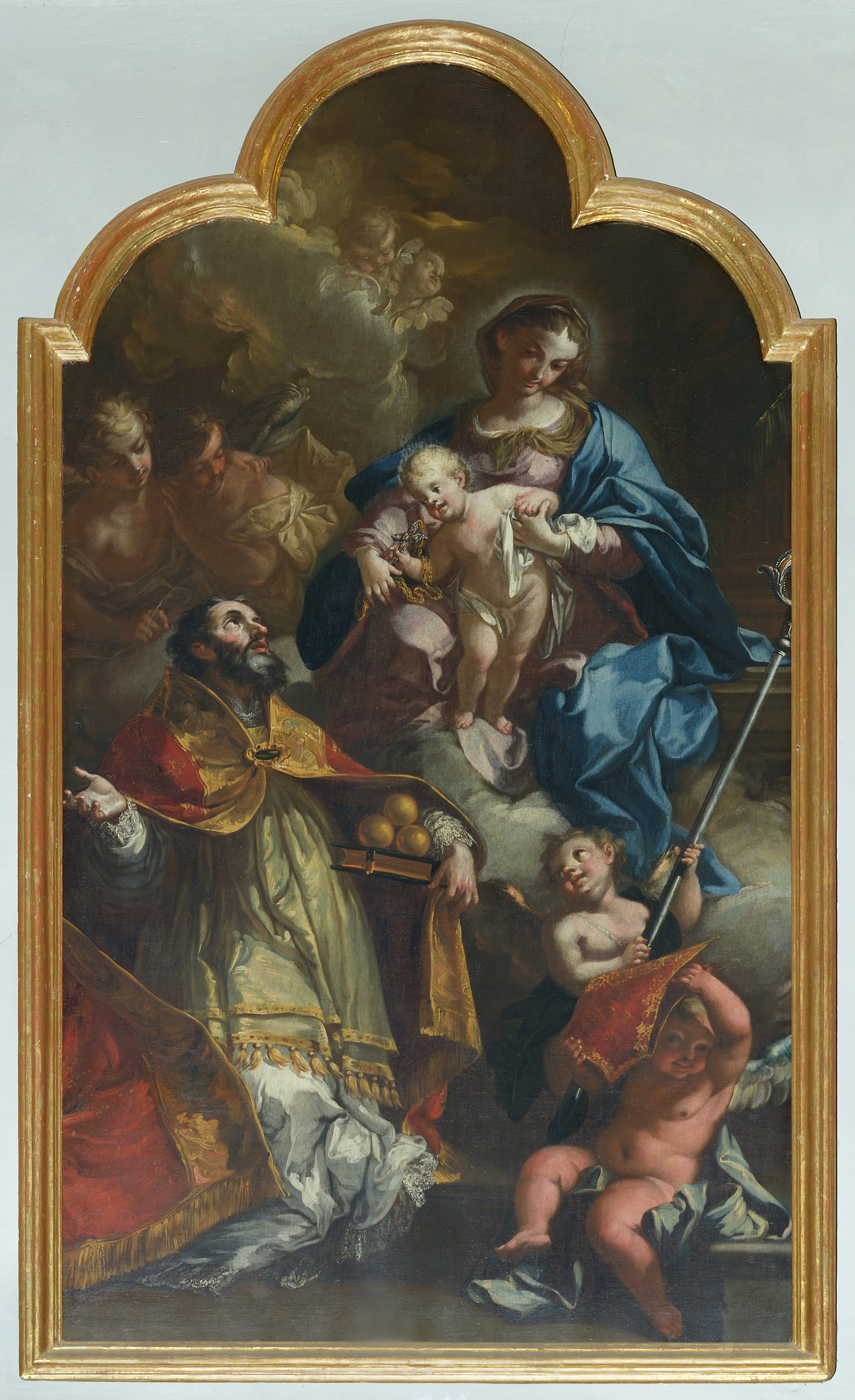 parish church of Kastelruth Lit.: Weingartner, I/1965, S. 212; Weingartner-Stadlhuber, I/1973 S. 158.